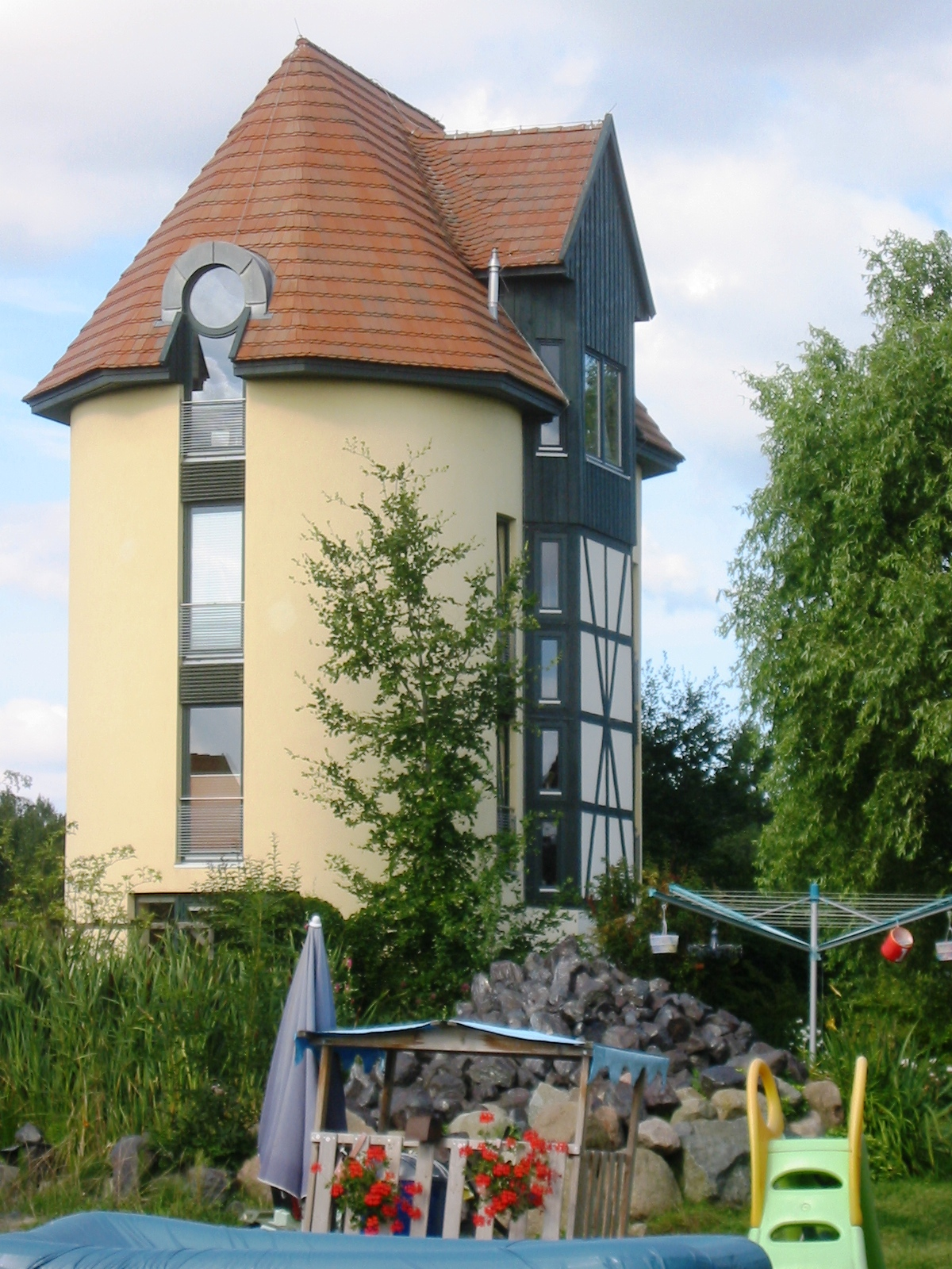 Denkmalgeschützter ehemaliger Futtersilo in Klein Kussewitz, umgebaut zu einem Wohngebäude; Blickrichtung nach Südwesten